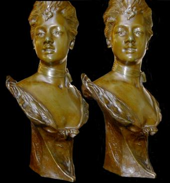 montage Roby Titre : Stéréogramme naturel ne nécessitant pas de système optique Licence : GFDL Source : © Roby 16 jan 2004 à 10:16 (CET) Roby